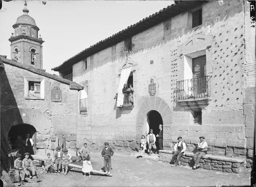 Imatge